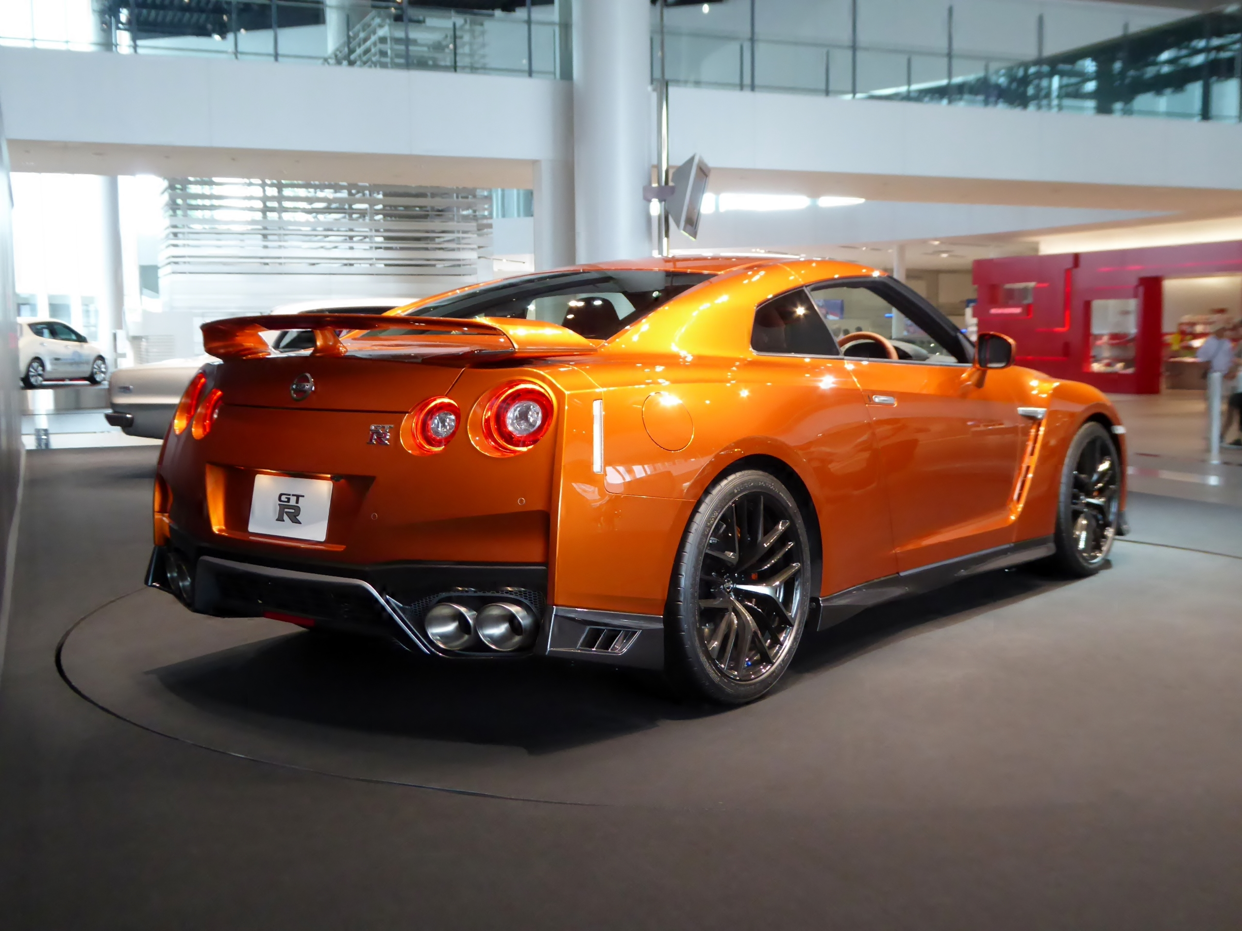 2017年式日産・GT-Rを撮影。